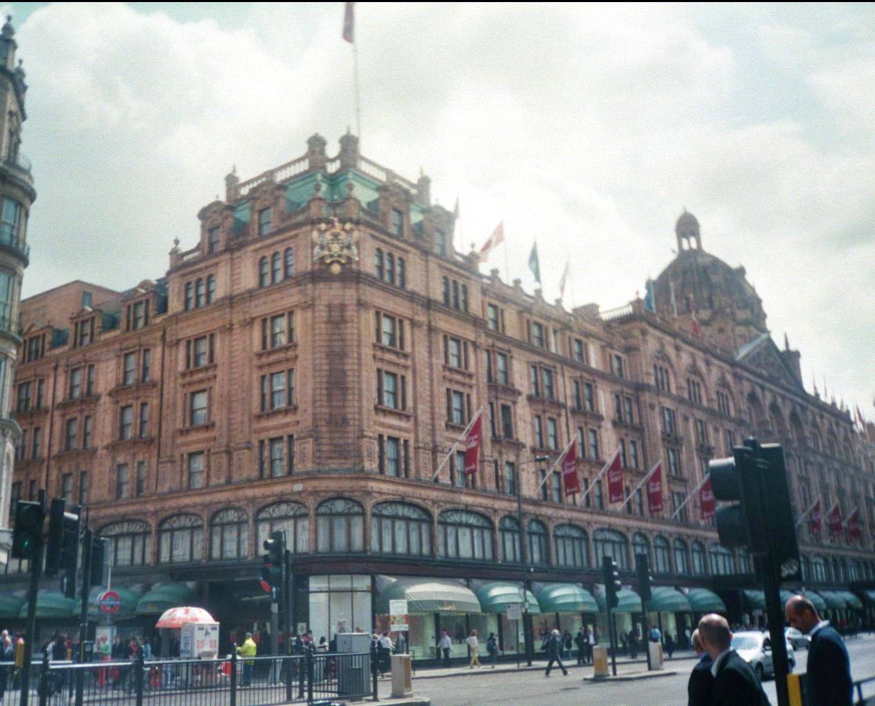 Autor: Carl Frieder Kathe Fassade des Londoner Warenhauses Harrods, fotografiert am Tag der Anschläge auf die Londoner U-Bahn. Fotografiert 2005 in London von mir selbst.